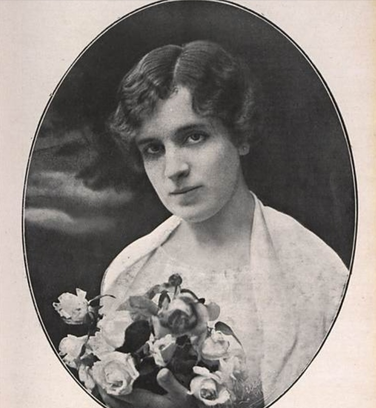 A pianista Antonietta Rudge.